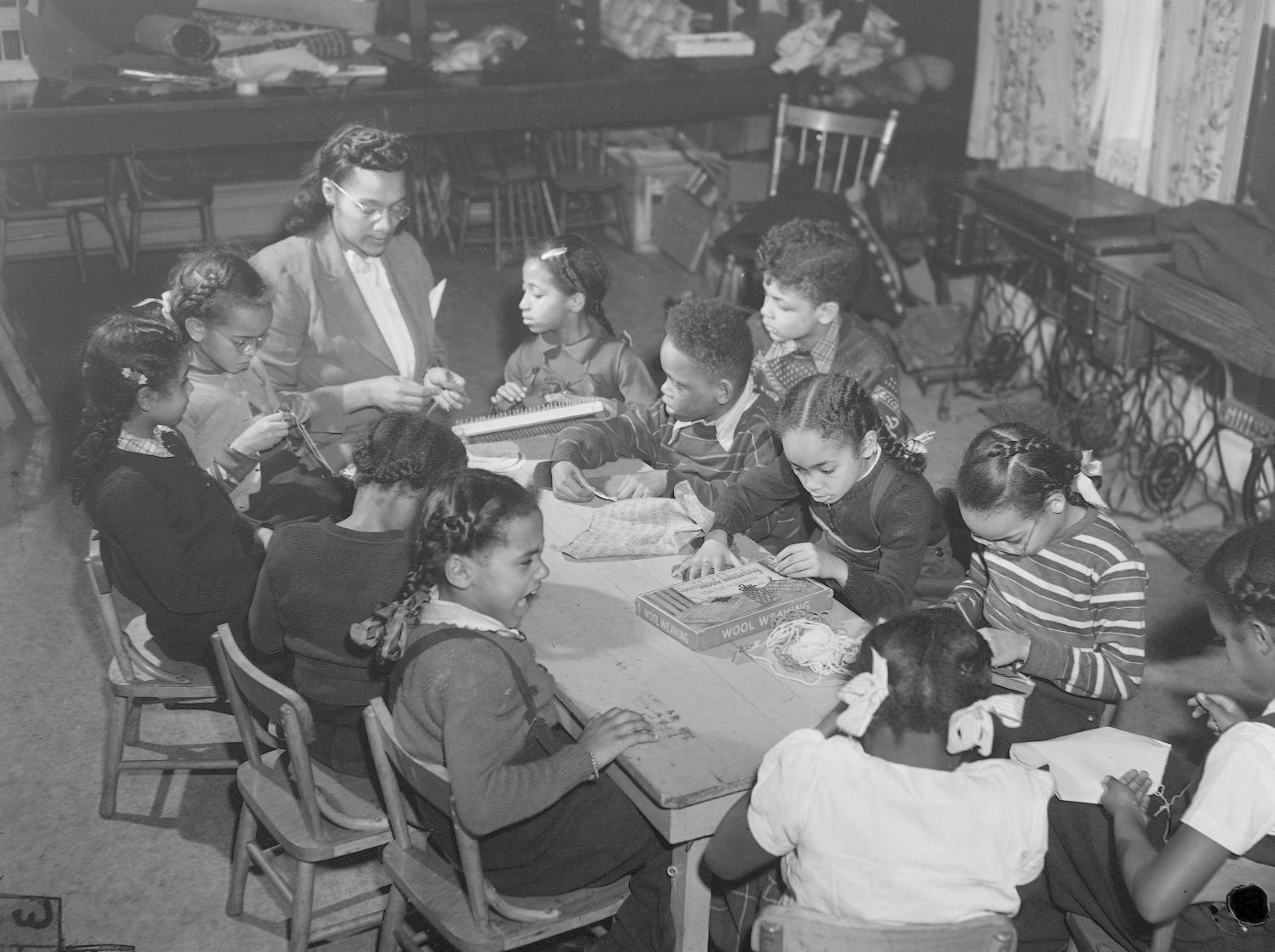 Des enfants, assis autour d'une table, tissent à l'aiguille avec l'aide d'une éducatrice. Ils sont au Negro Community Center de la rue Delisle à Montréal